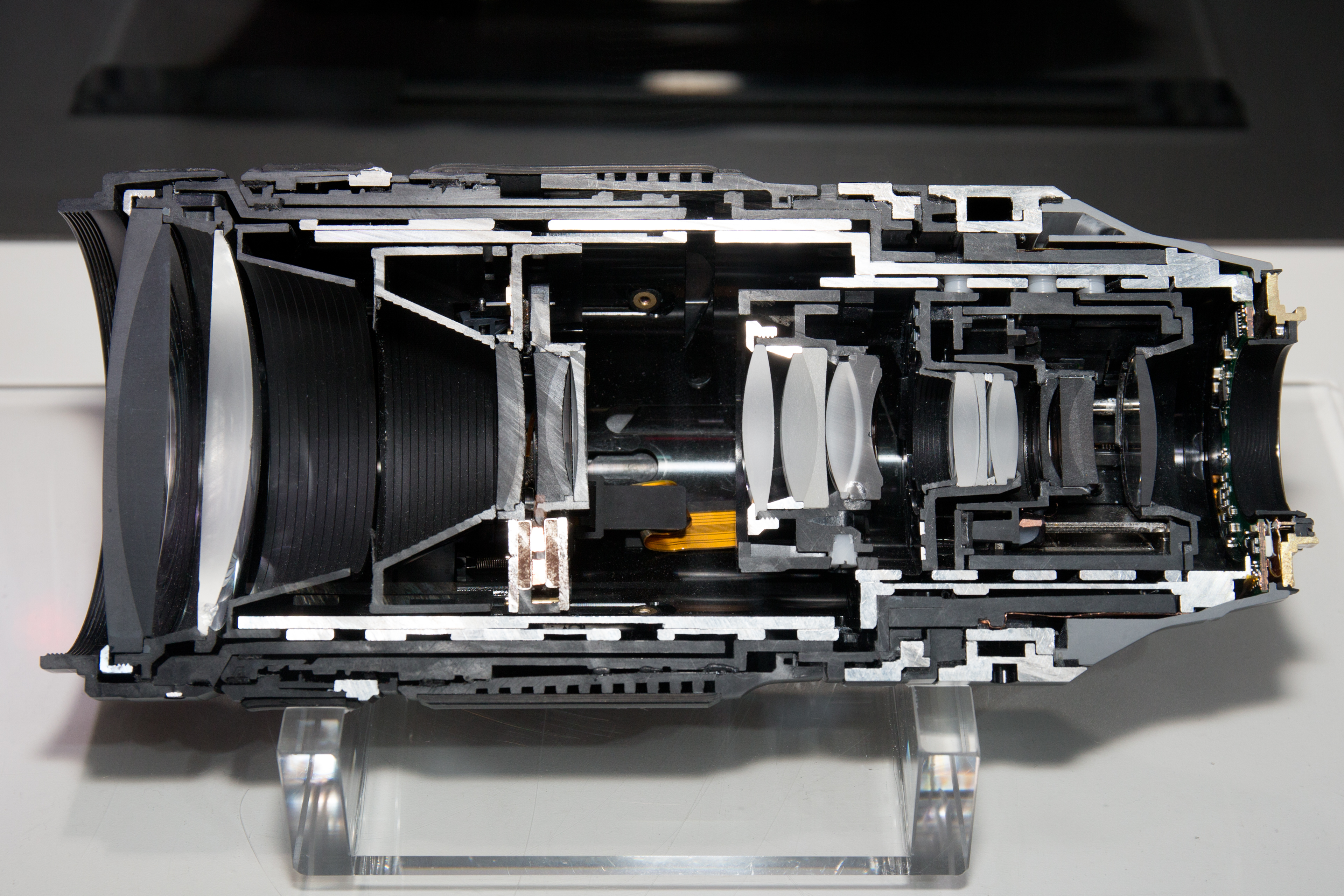 P&E China 2016: 2014 Fujinon XF100-400mm F4.5-5.6 R LM OIS WR